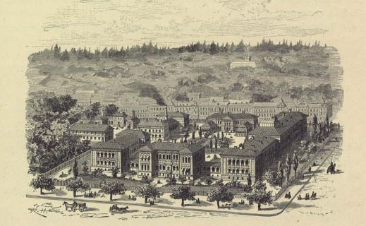 Allmänna Barnhuset, perspektivskiss. I bakgrunden skymtar Vanadislundens vattenreservoar